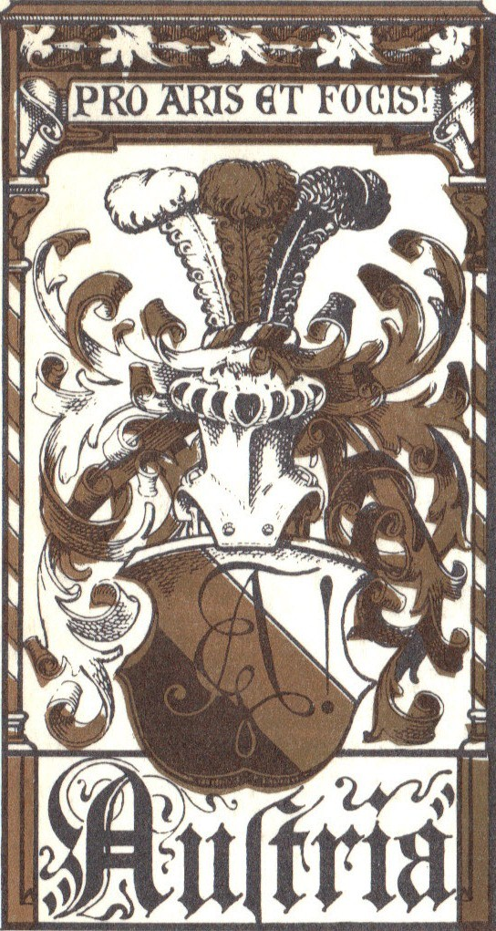 paef